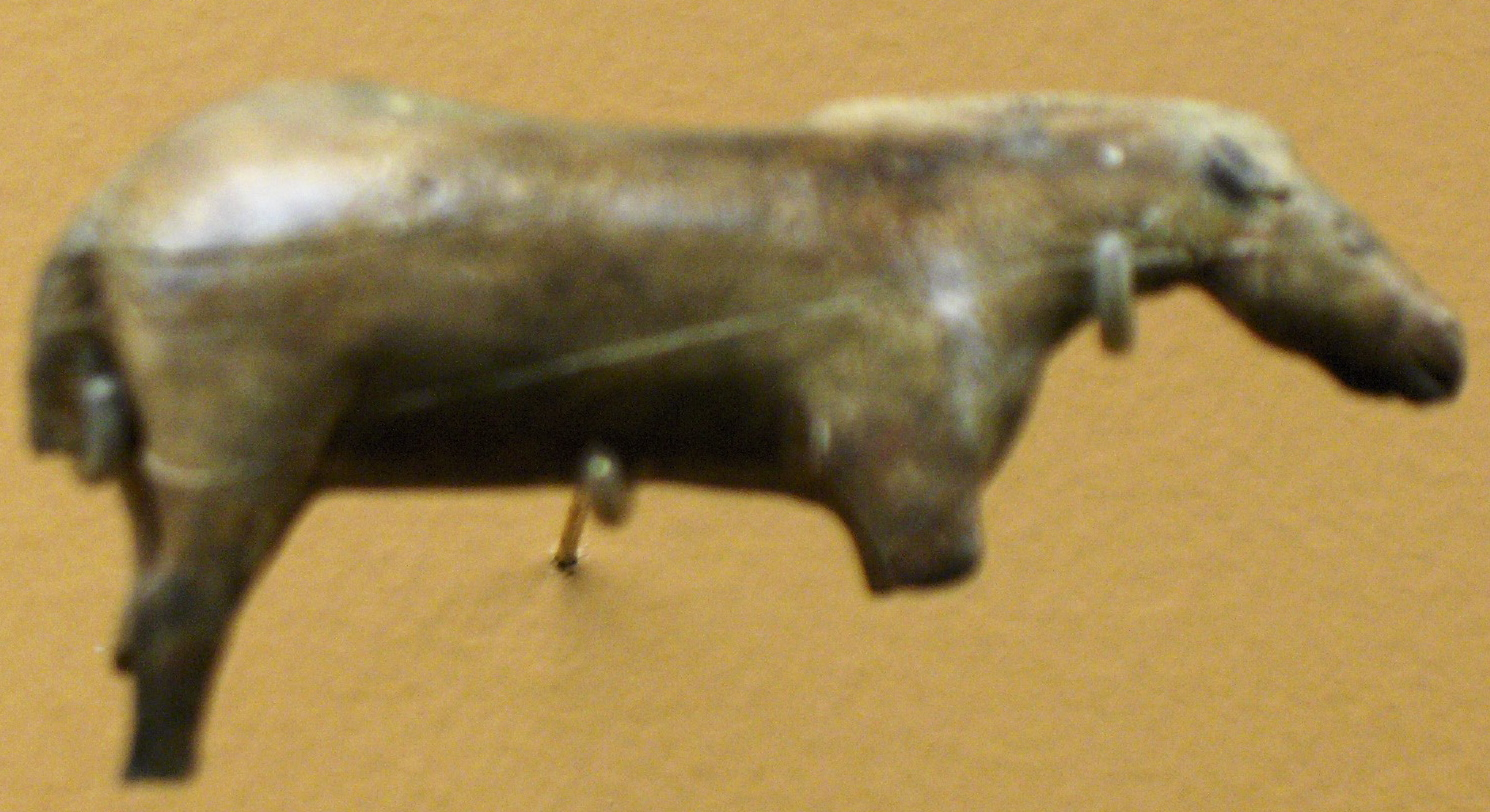 Cheval, os, France, période paléolithique, Musée des Antiquités Nationales, Saint-Germain en Laye